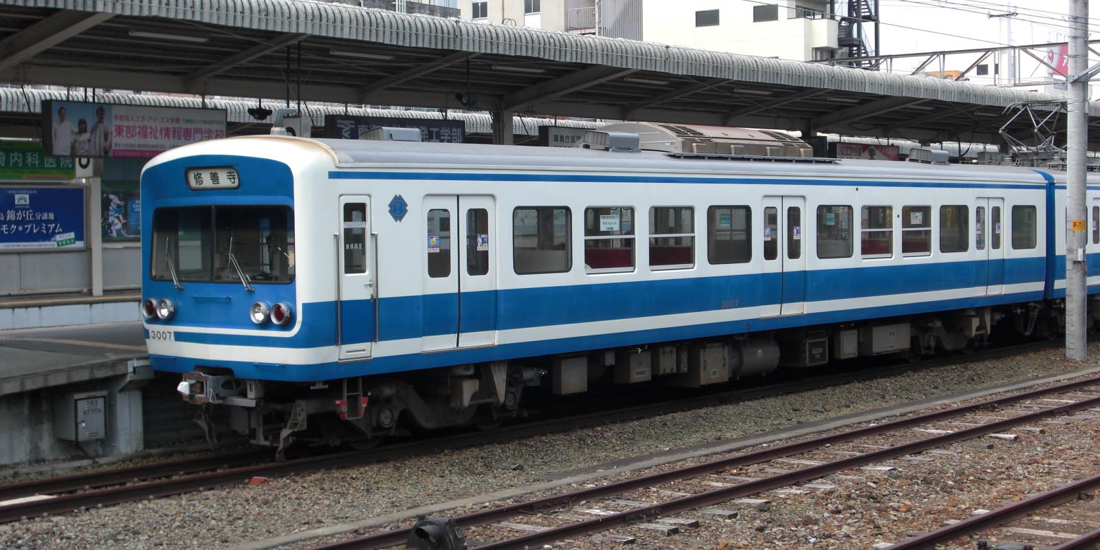 伊豆箱根鉄道駿豆線、クモハ3000形電車（クモハ3007）、三島駅にて撮影